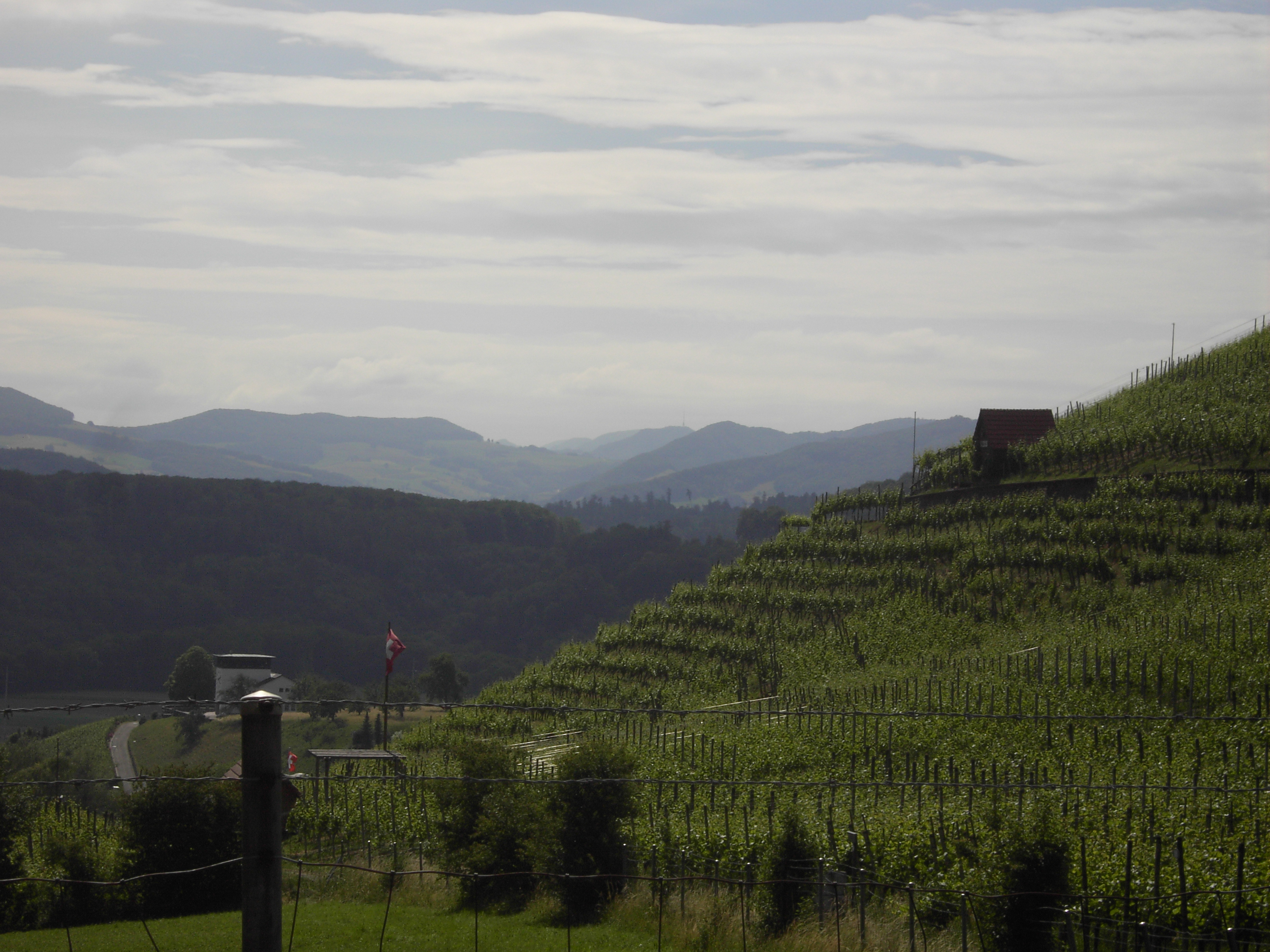 Rebberg Birmenstorf AG, Schweiz